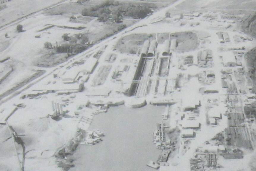 Construcción del túnel subfluvial que atraviesa el Río Paraná.